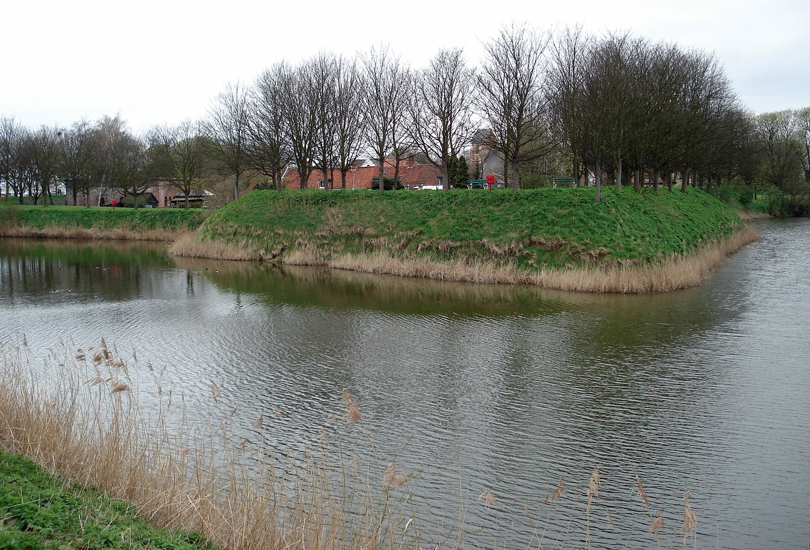 Fort Lillo, fort historique au nord d'Anvers, sur l'Escaut. Vue sur la douve, avec le 'bastion anglais' à l'avant-plan.